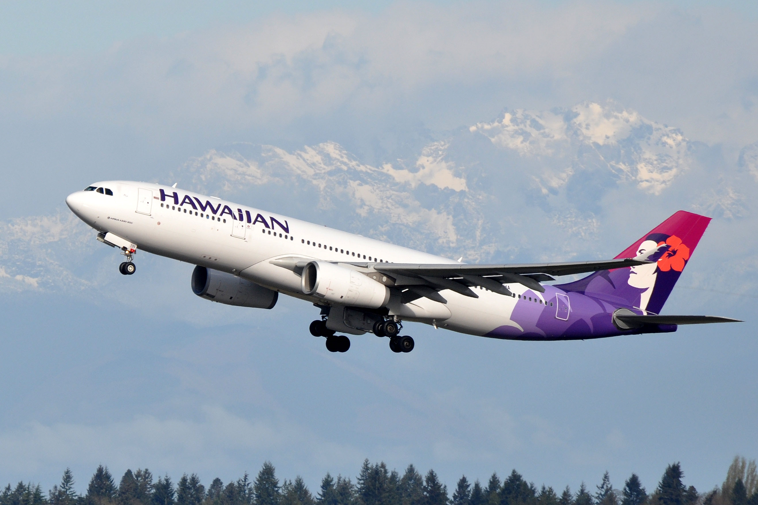 MSN 1469 A330-243 HAWAIIAN AIRLINES SEA AIRPORT